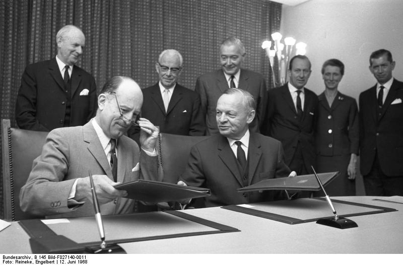 Ausstausch von Ratifikationsurkunden BRD (Sts. [Rolf] Lahr) - Niederlande (Botsch. [Jakobus] de Beus)